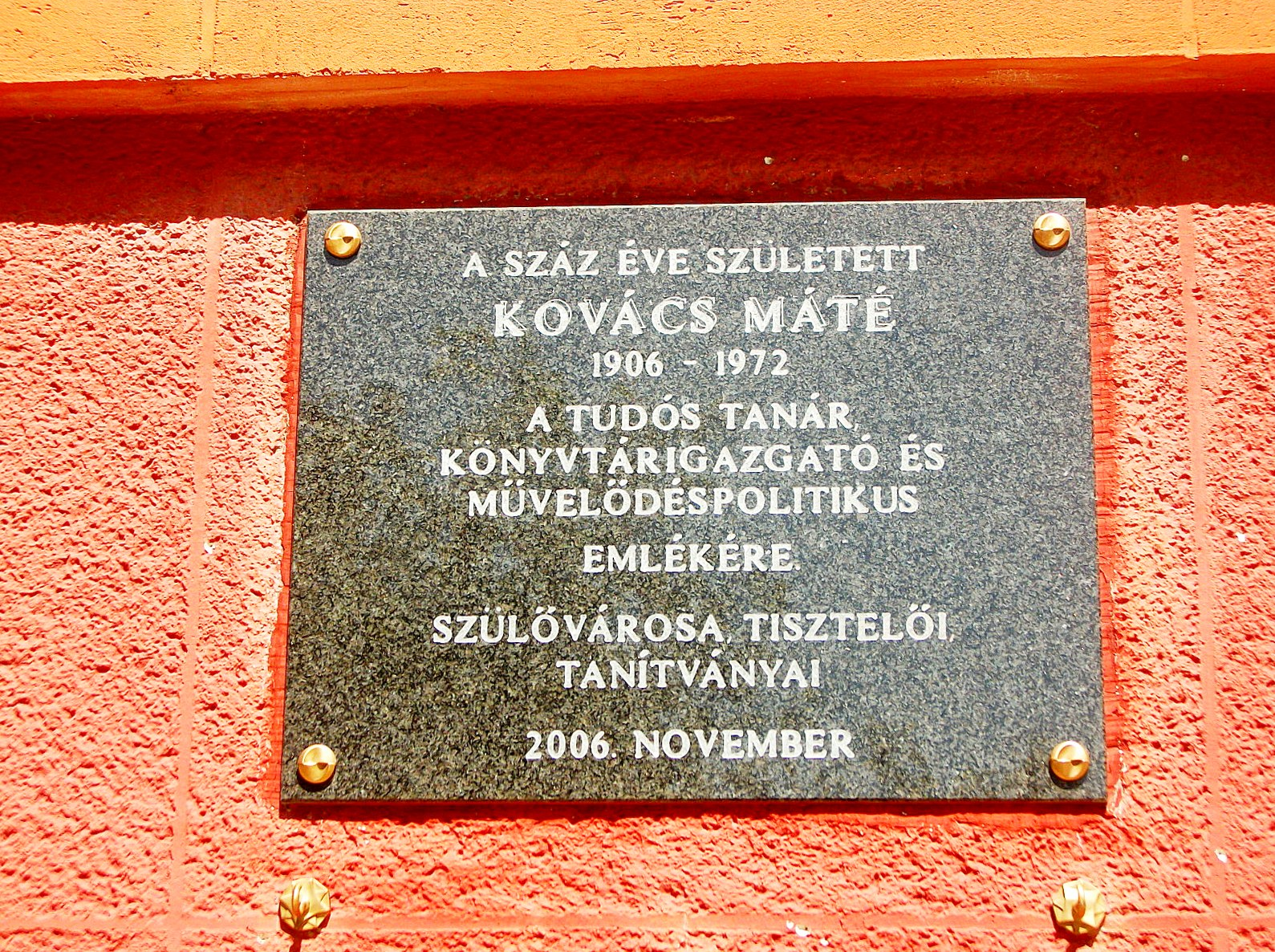 Kovács Máté 2006. novemberében felállított emléktáblája Hajdúszoboszlón.